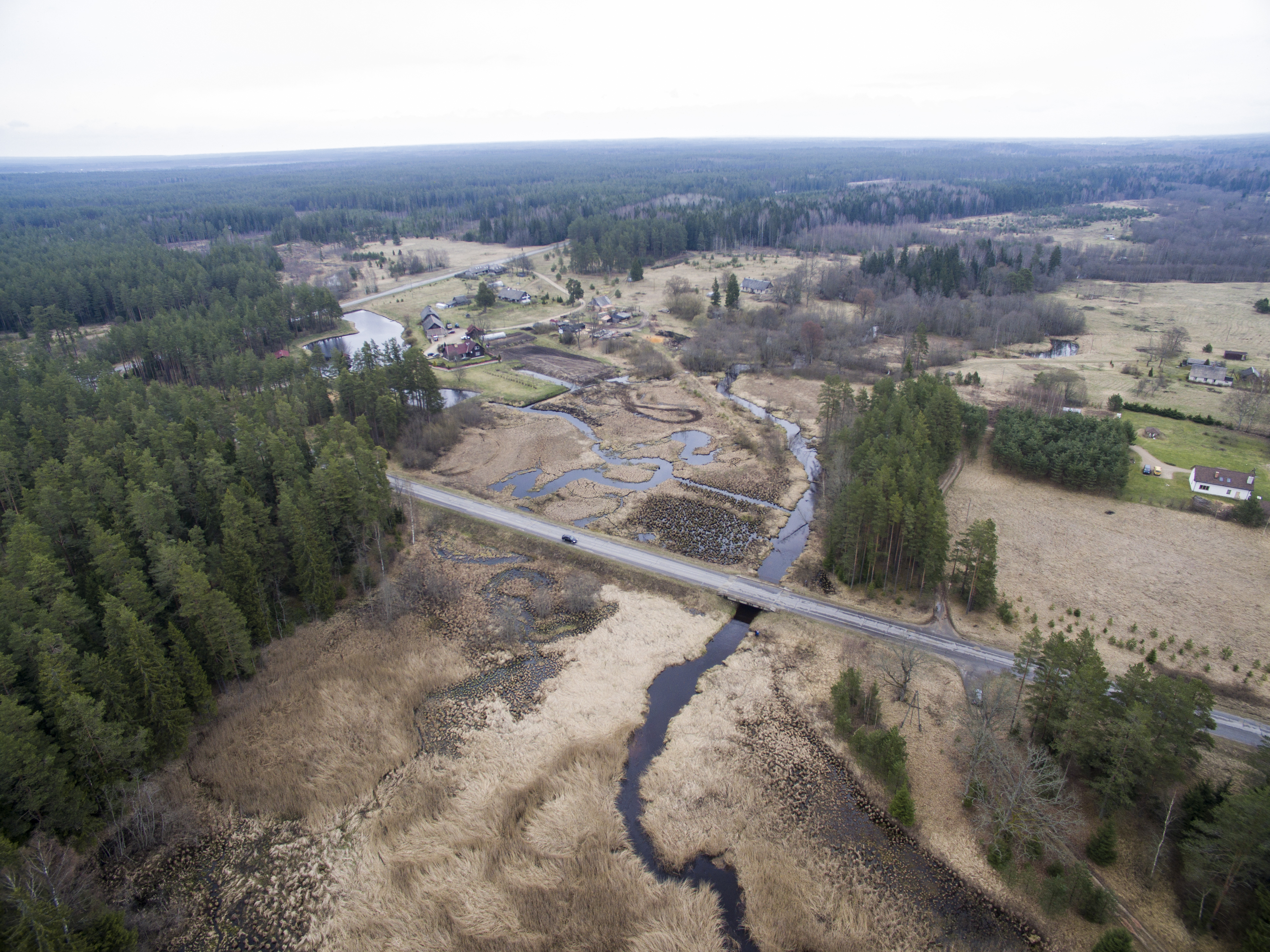 Allaži Parish, LV-2154, Latvia